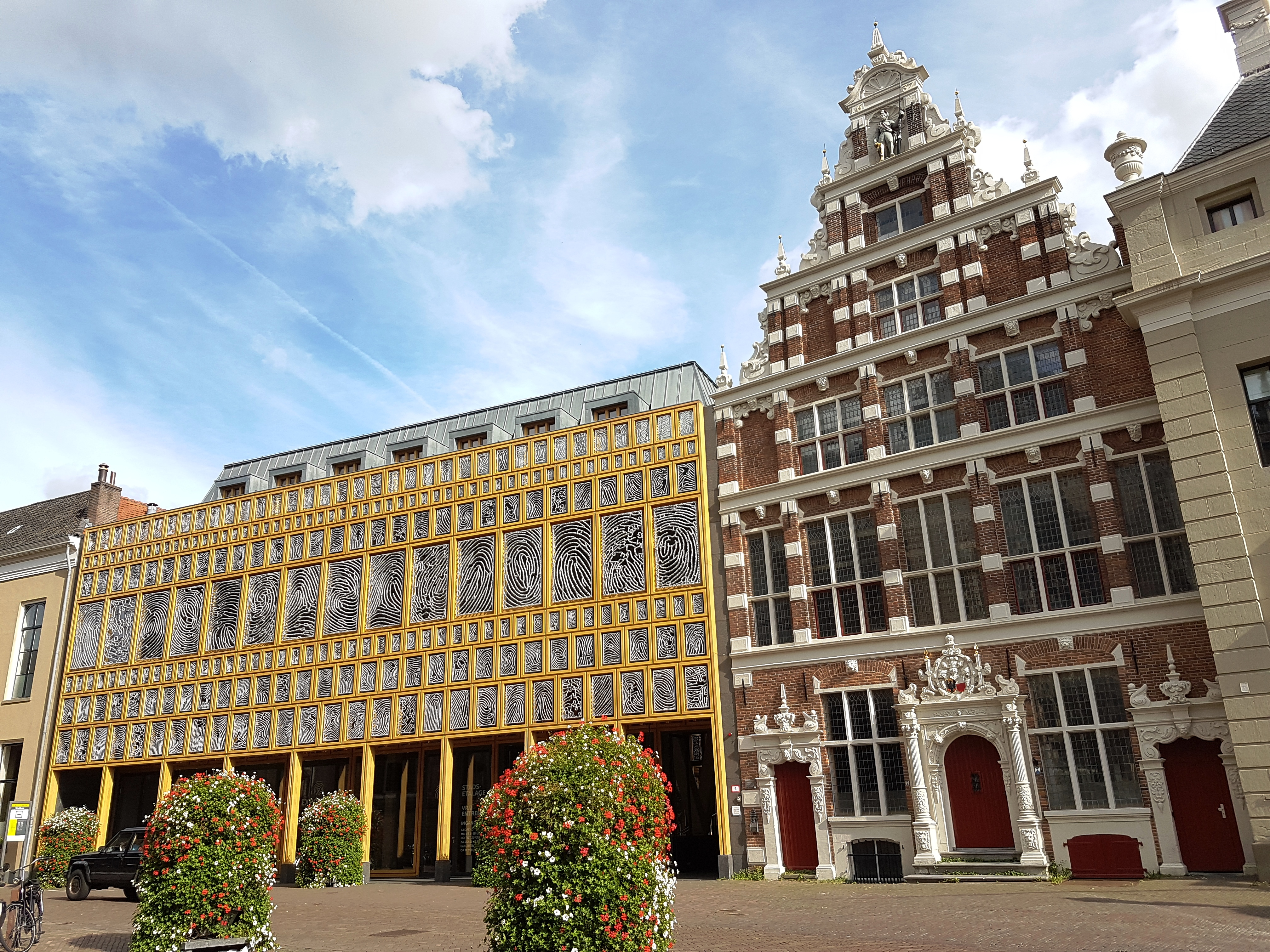 Gevels uitbouw stadhuis (2016, links) en het Landshuis (1632, rechts), aansluitend op de oorspronkelijke gevel van het stadhuis (1693, rechts van de foto)